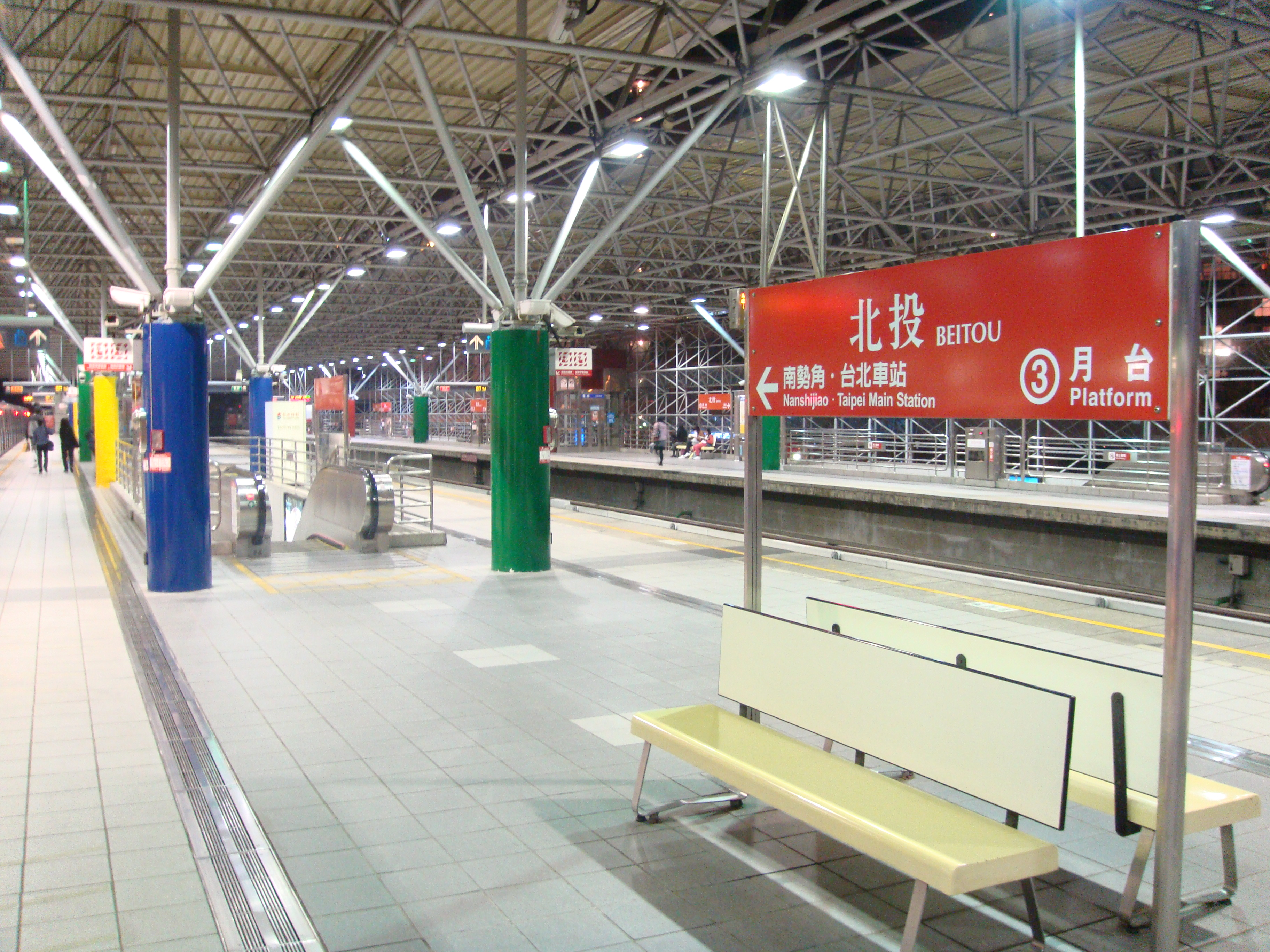 Beitou Station, Danshui Line, Taipei Metro, Taiwan.